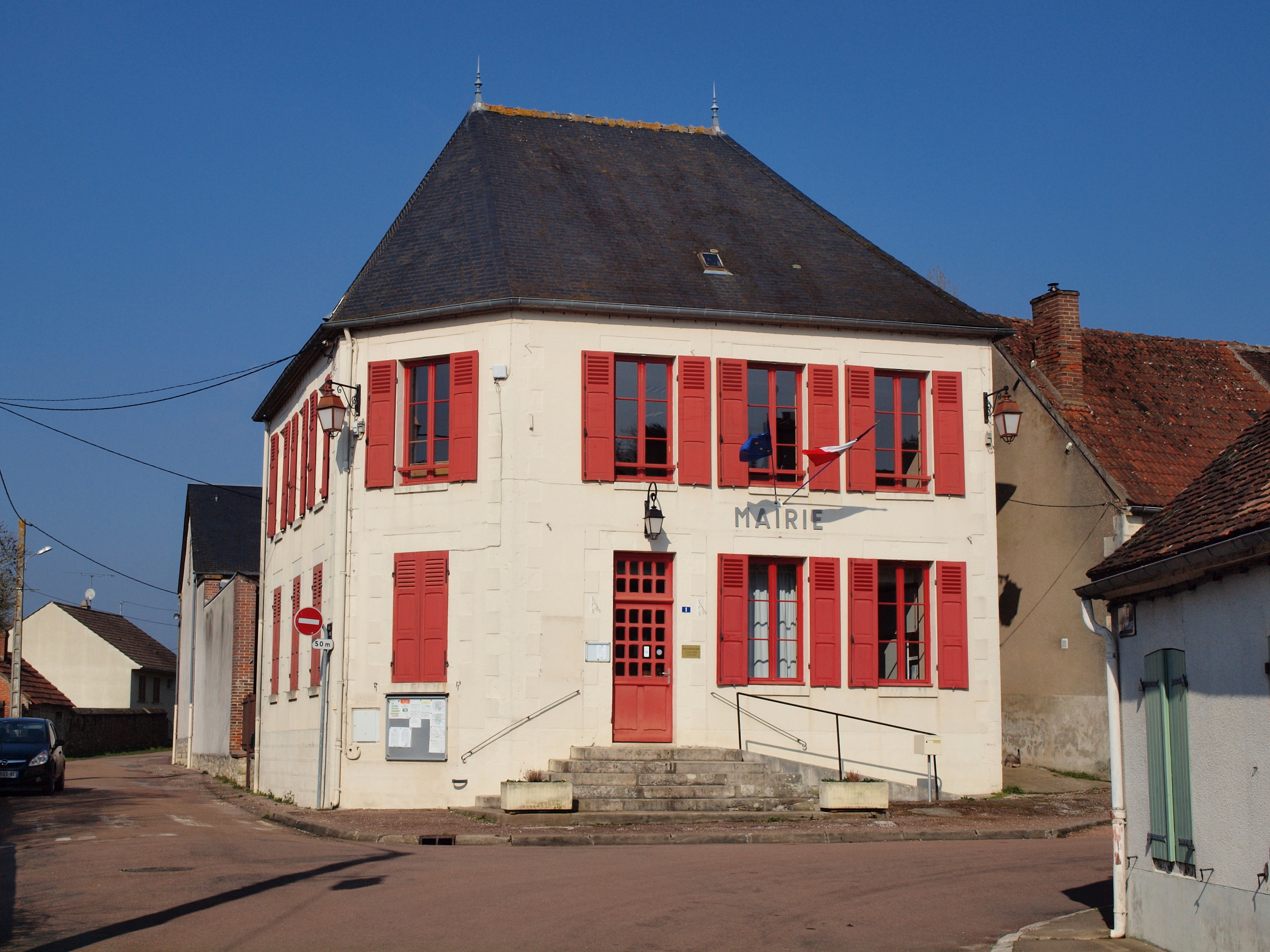 Mairie de Rogny-les-Sept-Écluses (Yonne, France)